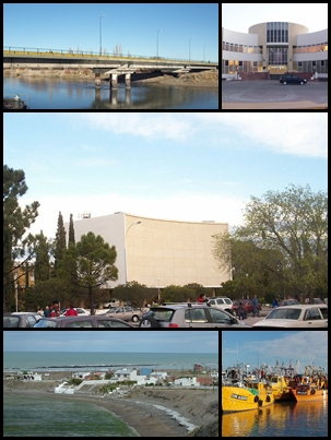 Montaje de Rawson, Patagonia Argentina